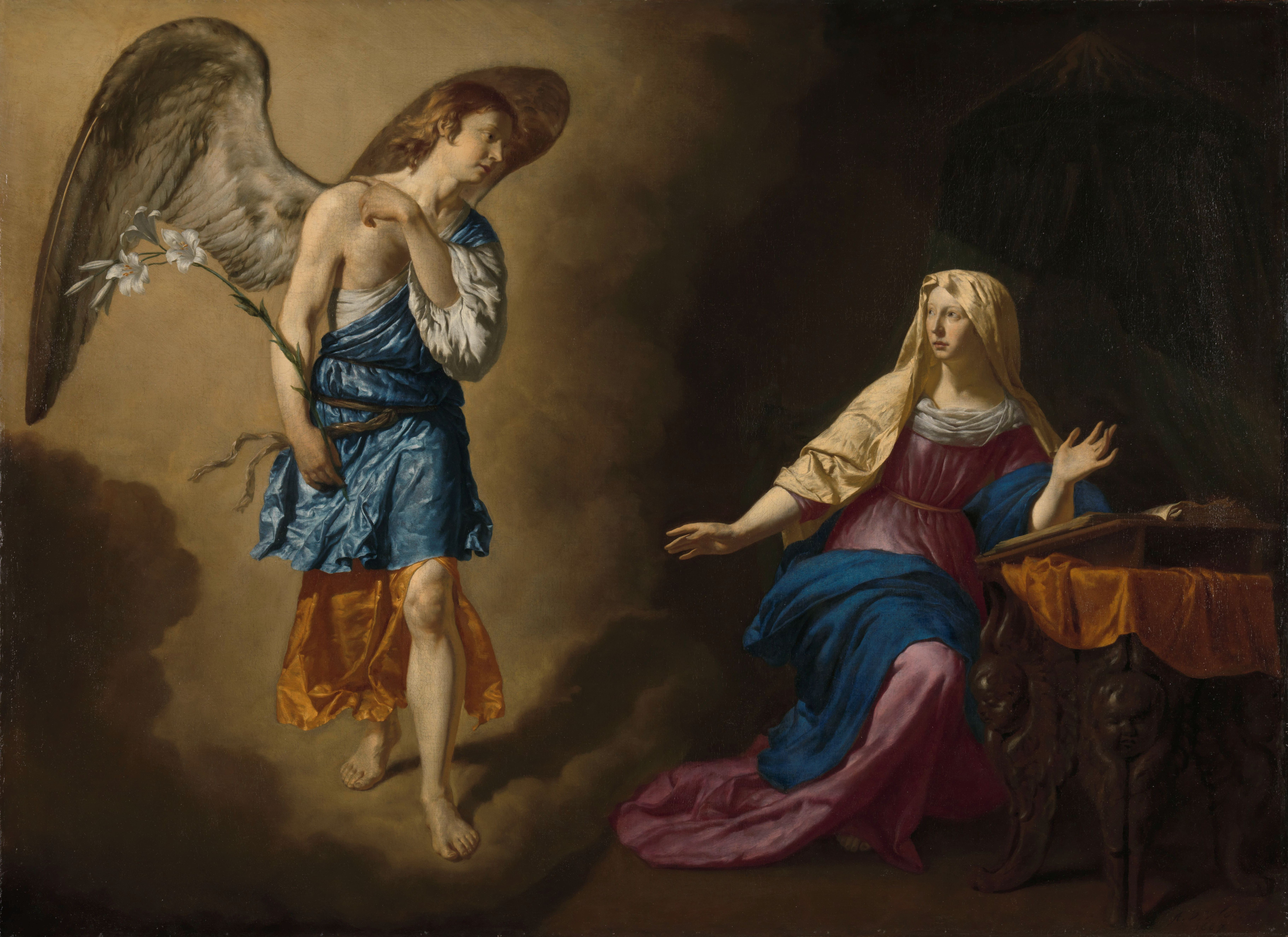 De verkondiging aan Maria. Links verschijnt de engel met een lelietak uit de wolken, rechts zit Maria voor een opengeslagen boek dat op een tafel ligt.; Adriaen van de Velde (1636–1672), olieverf op doek, 1667